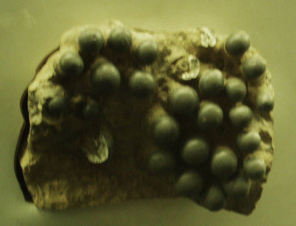 Fossil of Lepidotes, an extinct fish- Took the photo at Senckenberg Museum of Frankfurt